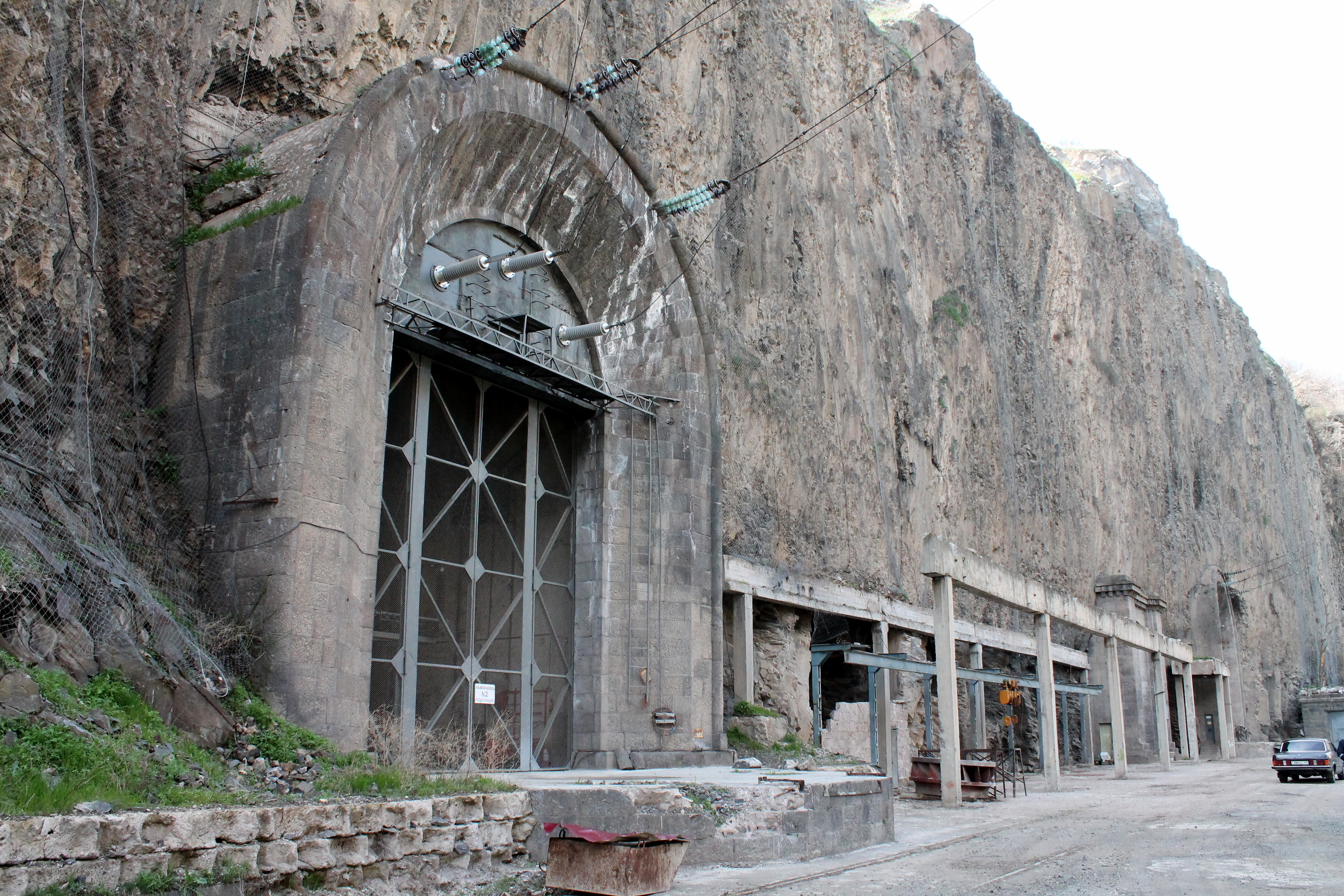 Выходные порталы Арзнинской ГЭС